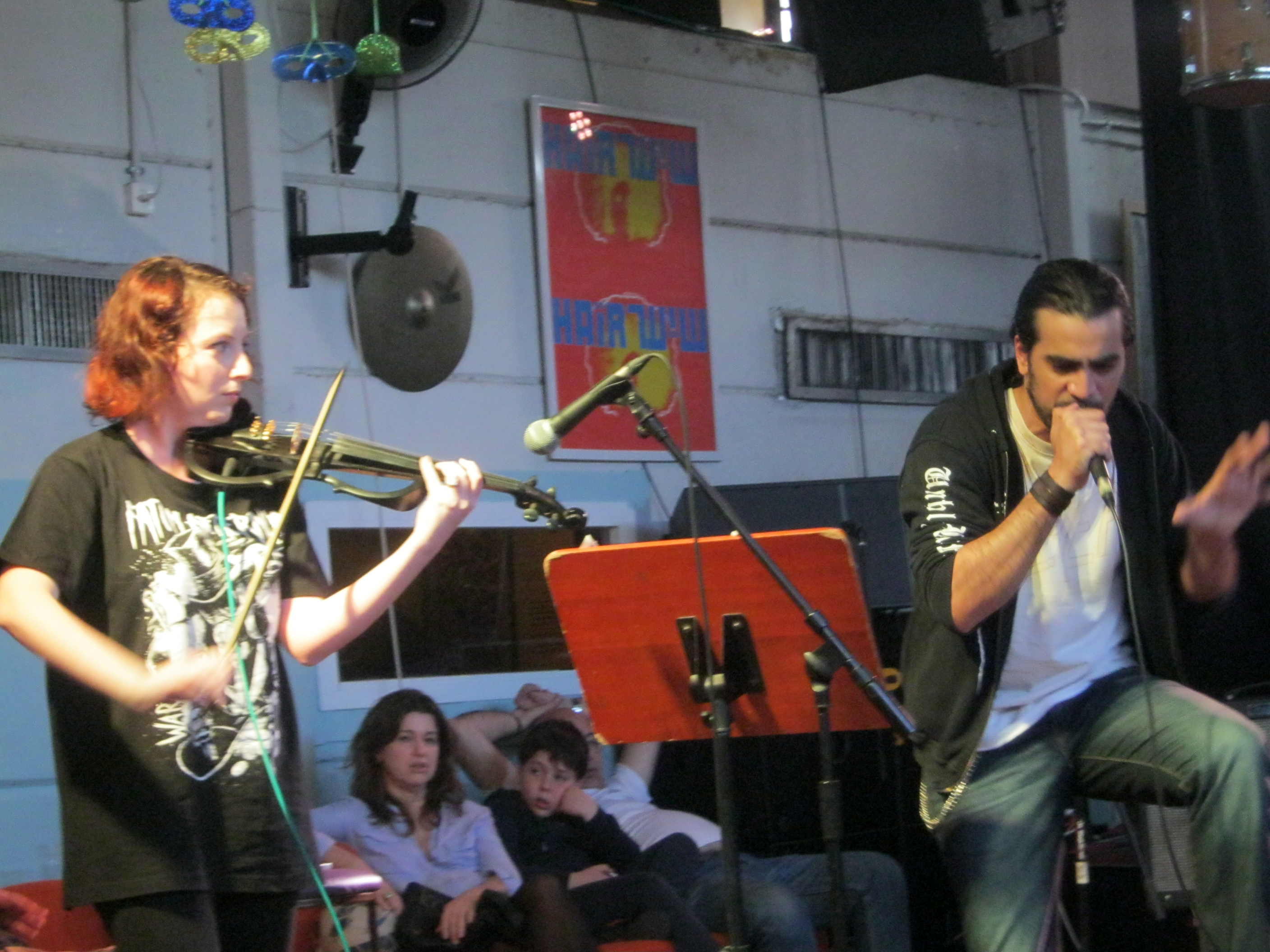 Israel metal musicians Yochai Davidoff and Evelyn Shor (from Fatum Aeternum), 2016